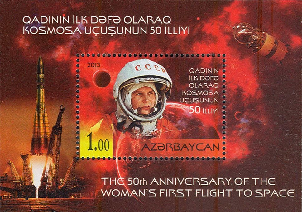 N 1110 - 1 manat. The 50th Ann. of the woman's first flight to space.